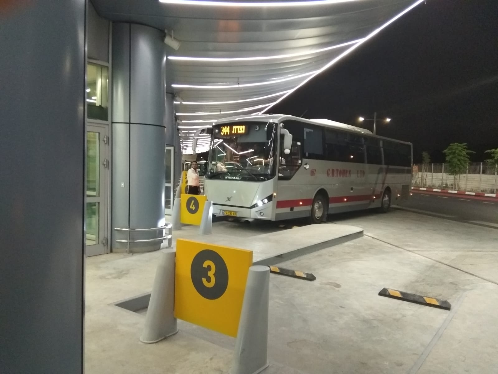 רציפי האוטובוסים הבין עירונים